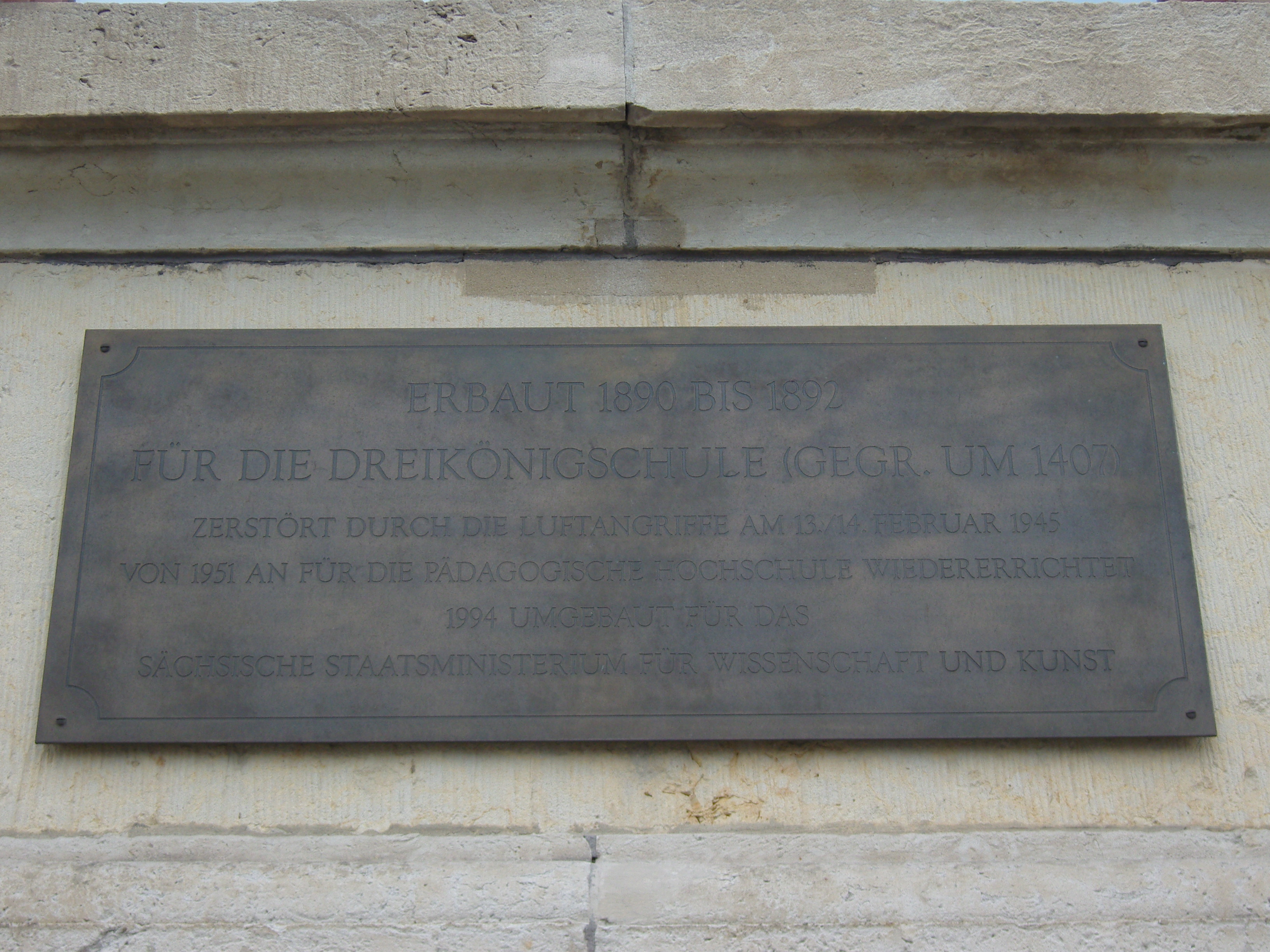 Gedenktafel für die ehemalige Dreikönigsschule am Sächsischen Staatsministerium für Wissenschaft und Kultur in Dresden